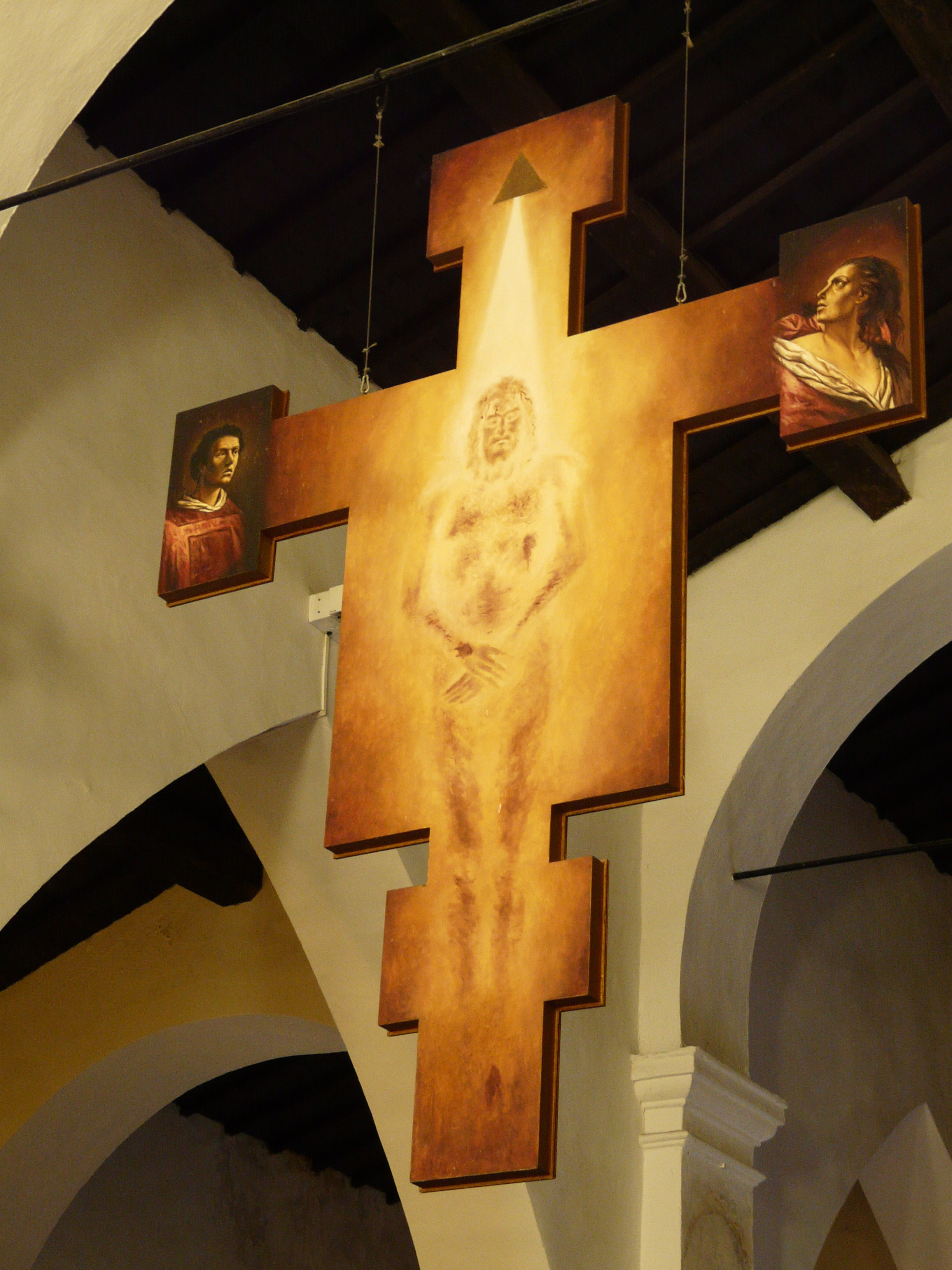 Crocifisso della pieve dei Santi Stefano e Margherita di Baccano, Arcola, Liguria, Italia